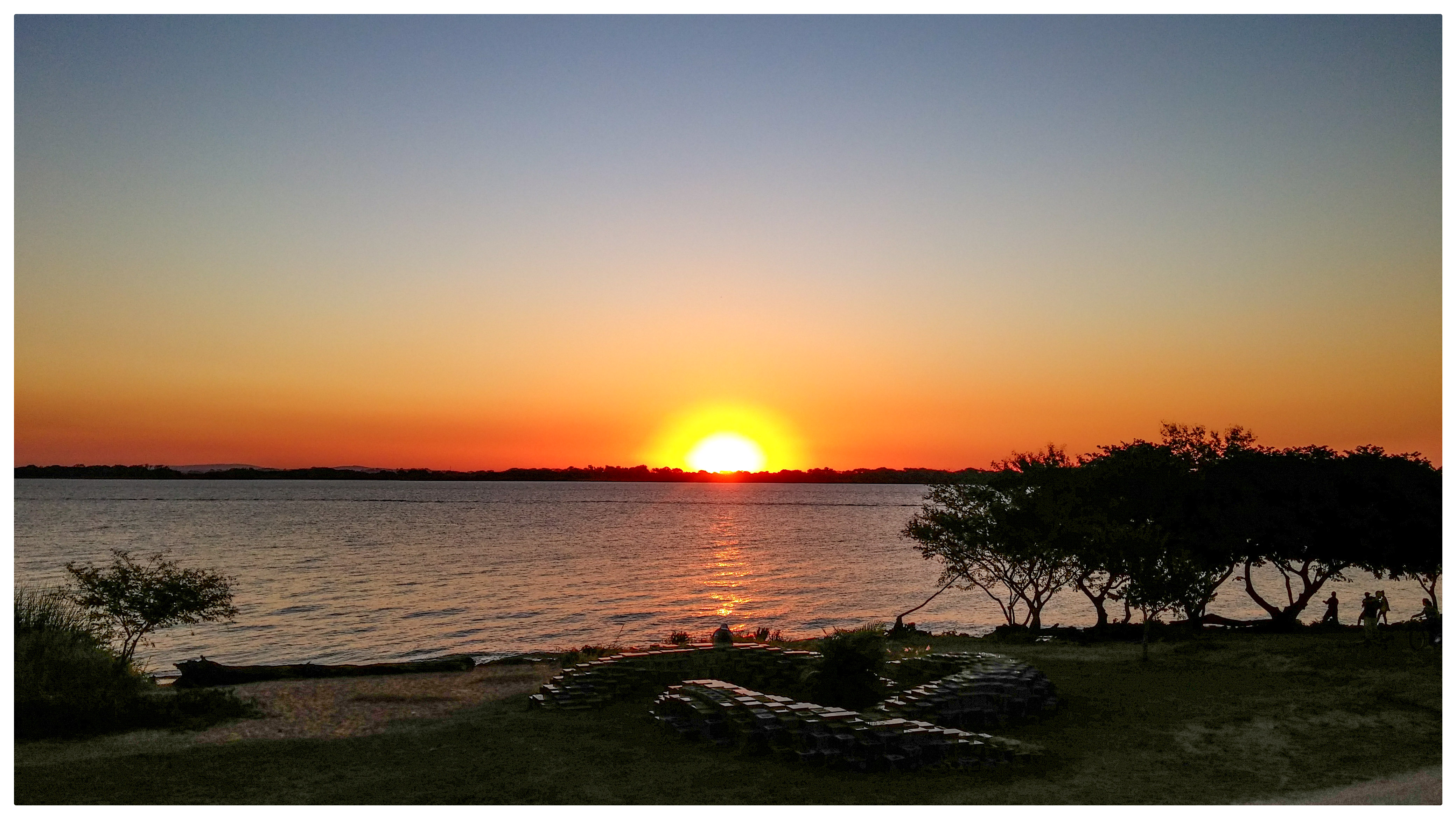 Por do sol no Lago Guaíba